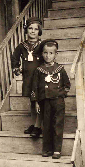 Srpskohrvatski / српскохрватски: Slika iz ranog detinjstva, Božidar sa sestrom Paraskevom.